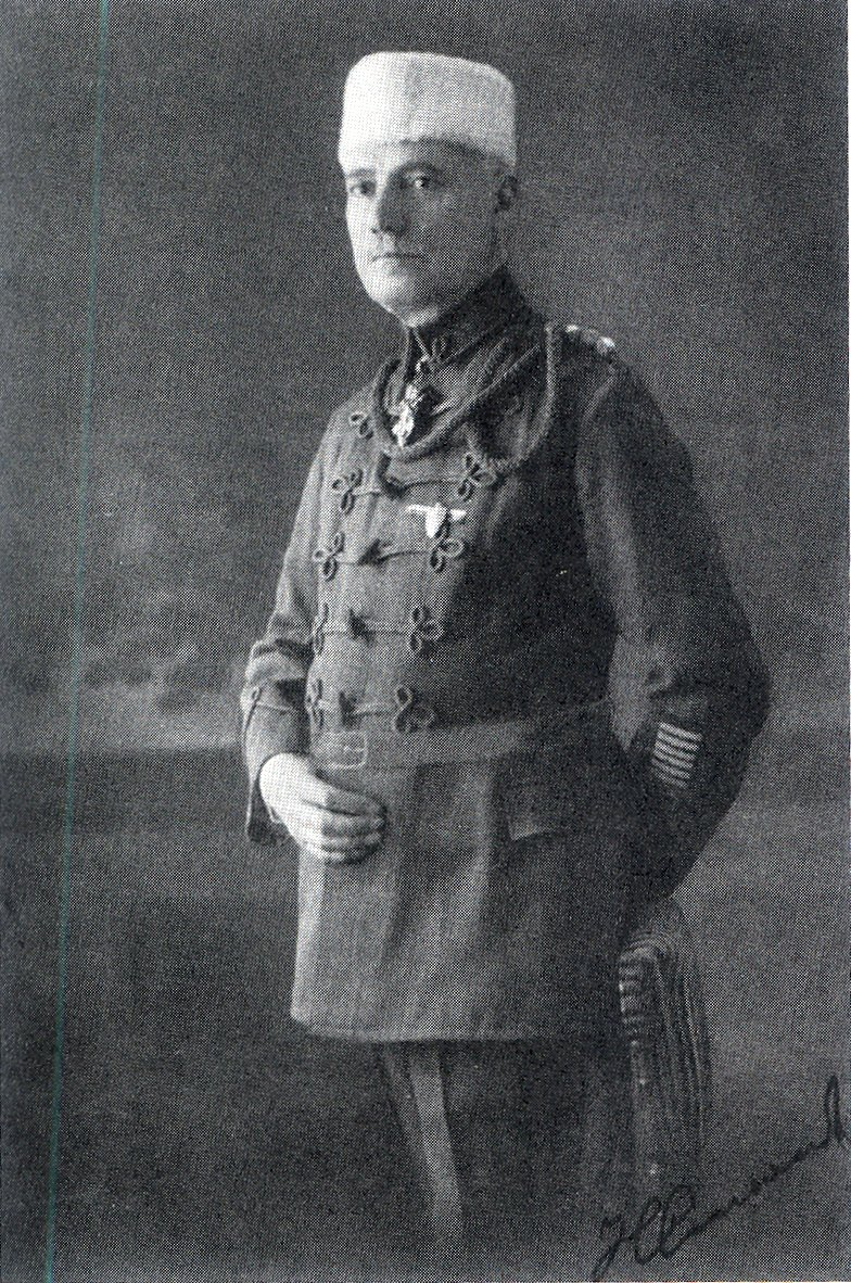 Никола Стоянов в униформа на Съюз "Юнак"